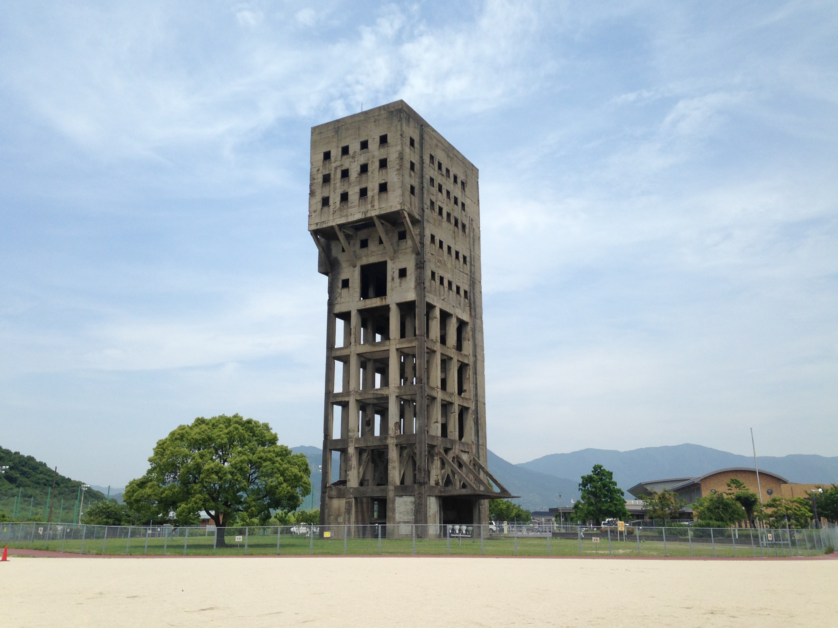 志免鉱業所竪坑櫓